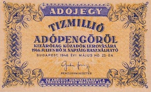 10 000 000 adópengő tax bill (1946) - obverse